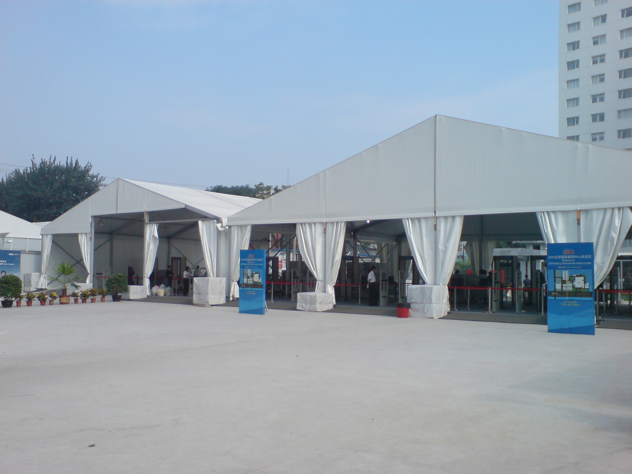 2008北京国际媒体中心安检棚,The Southgates of BIMC